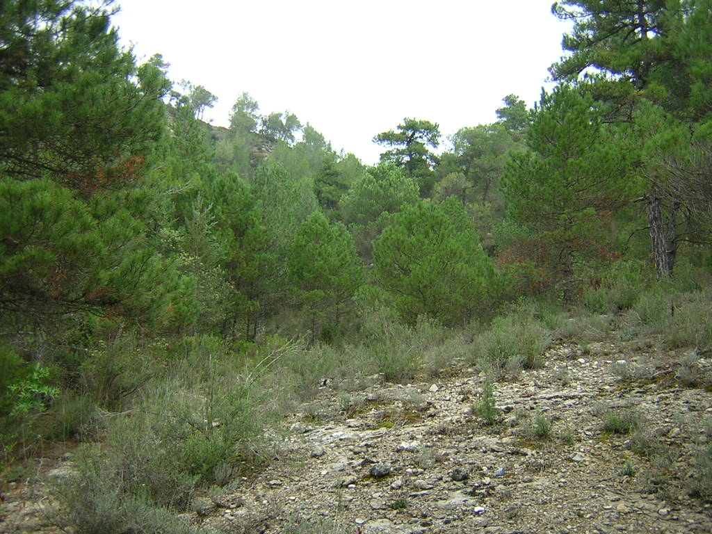 Capçalera del torrent de la Fàbrega (Monistrol de Calders, Moianès)